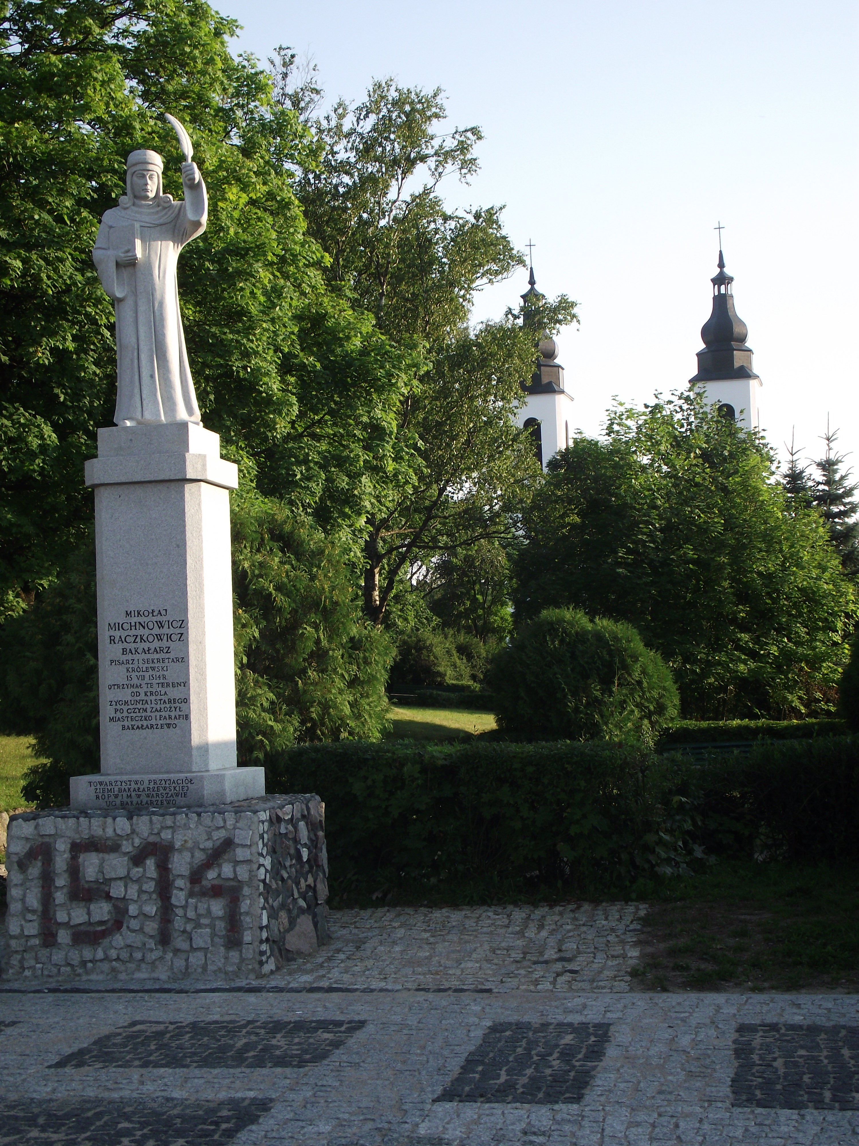 Pomnik Mikołaja Michnowicza Raczkowicza Bakałarza został wybudowany z inicjatywy Towarzystwa Przyjaciół Ziemi Bakałarzewskiej wspólnie z Urzędem Gminy Bakałarzewo oraz Radą Ochrony Pamięci Walk i Męczeństwa w 2009r. Pomnik znajduje się na pięknym, zabytkowym rynku w samym sercu Bakałarzewa.